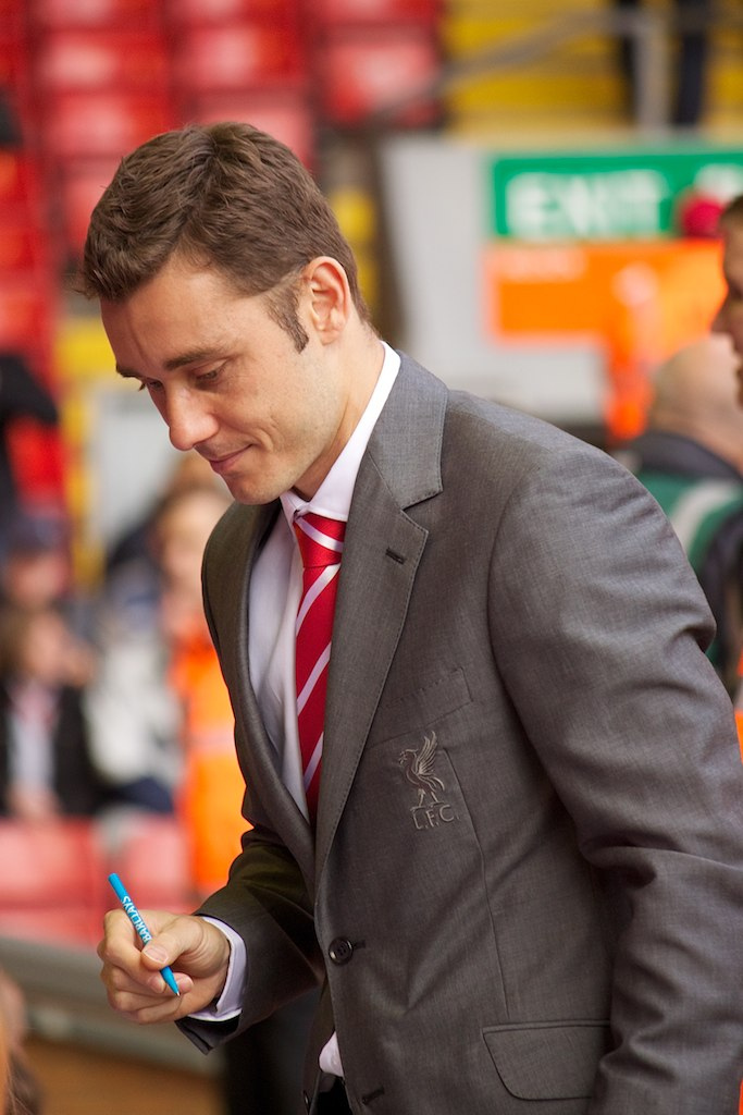 Liverpool vs Bolton 27/08/2011